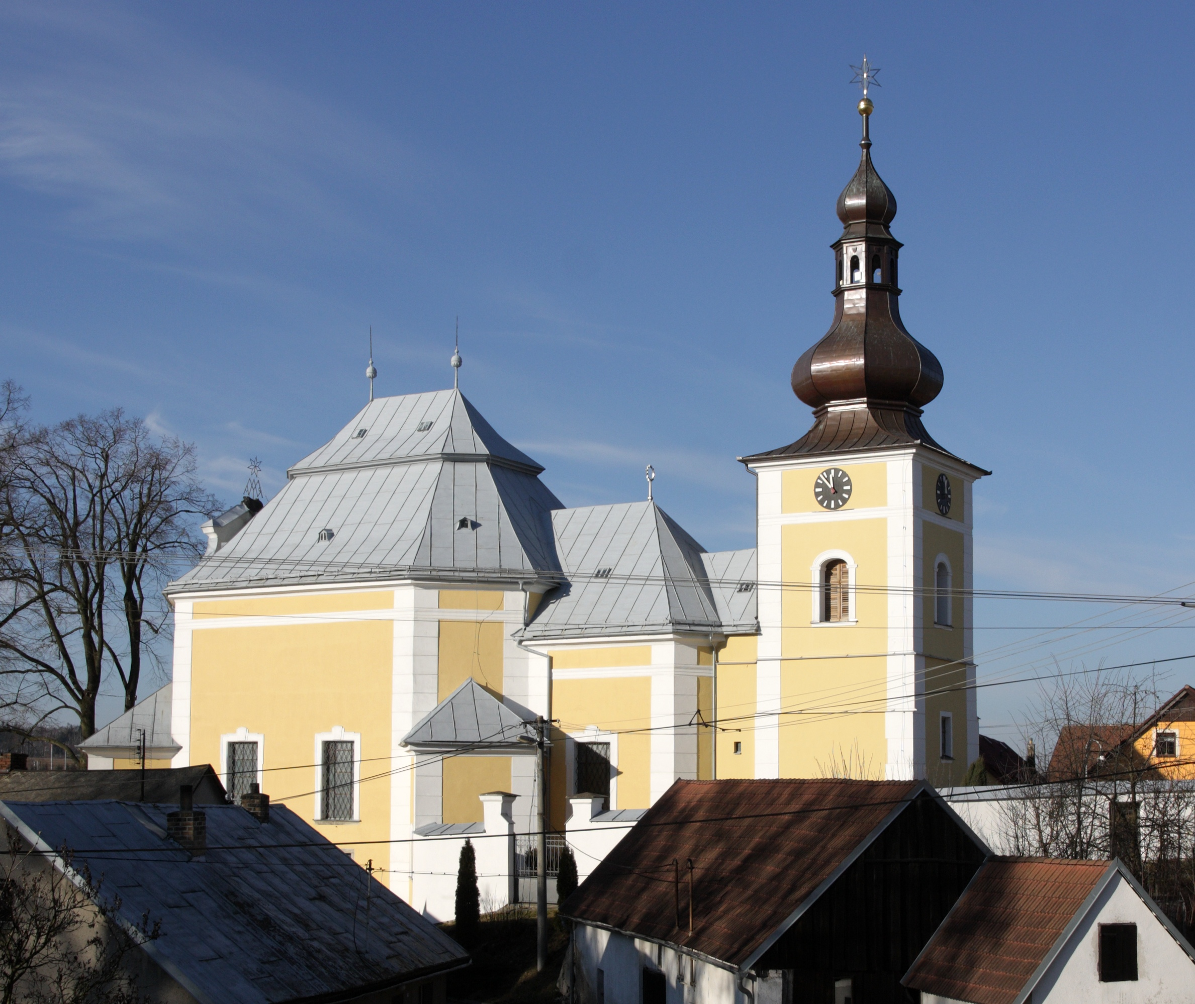 Obyčtov - kostel Navštívení Panny Marie.